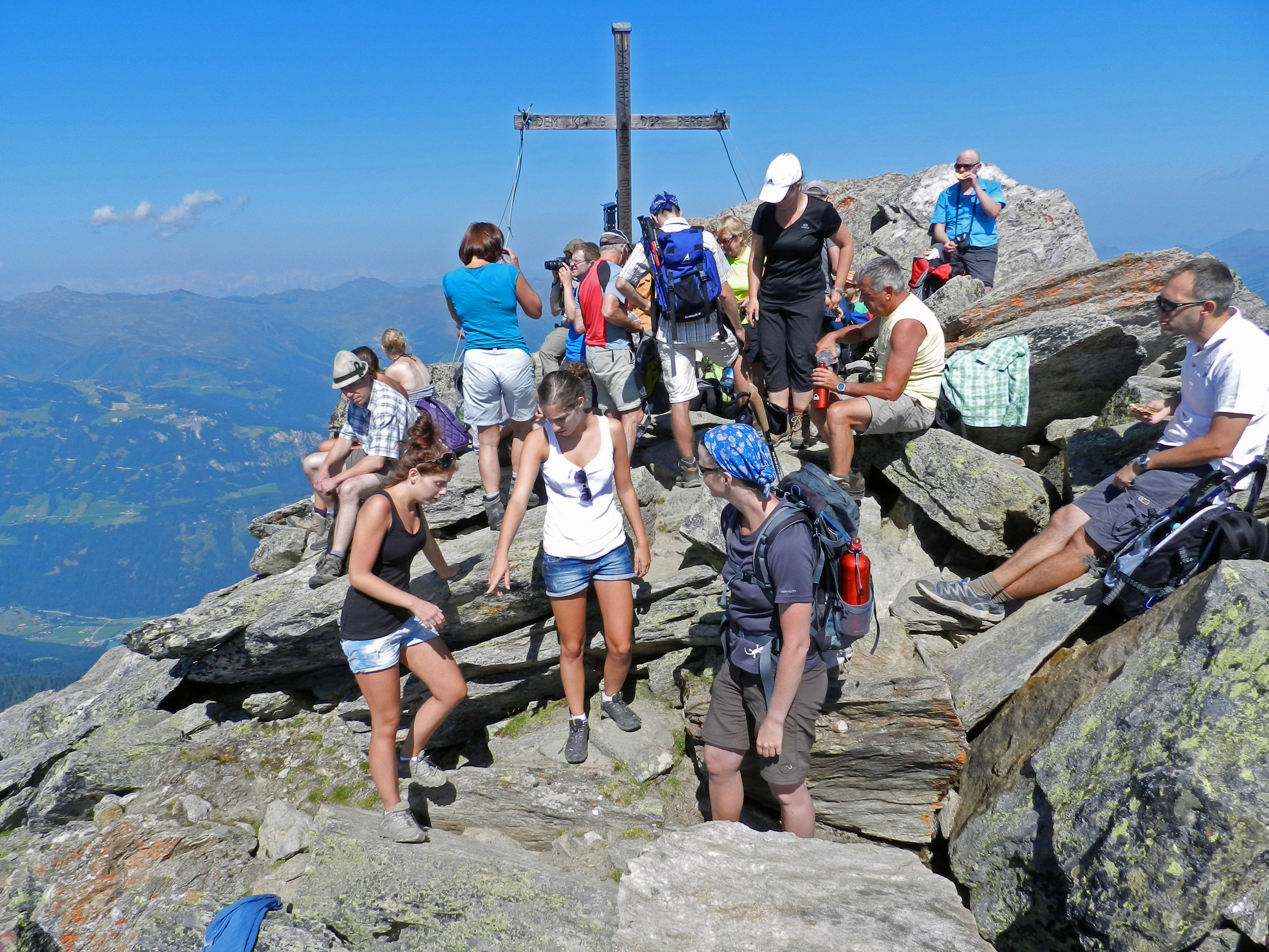 Gipfel der Ahornspitze (Zillertaler Alpen, Tirol, Österreich) an einem Werktag im Sommer